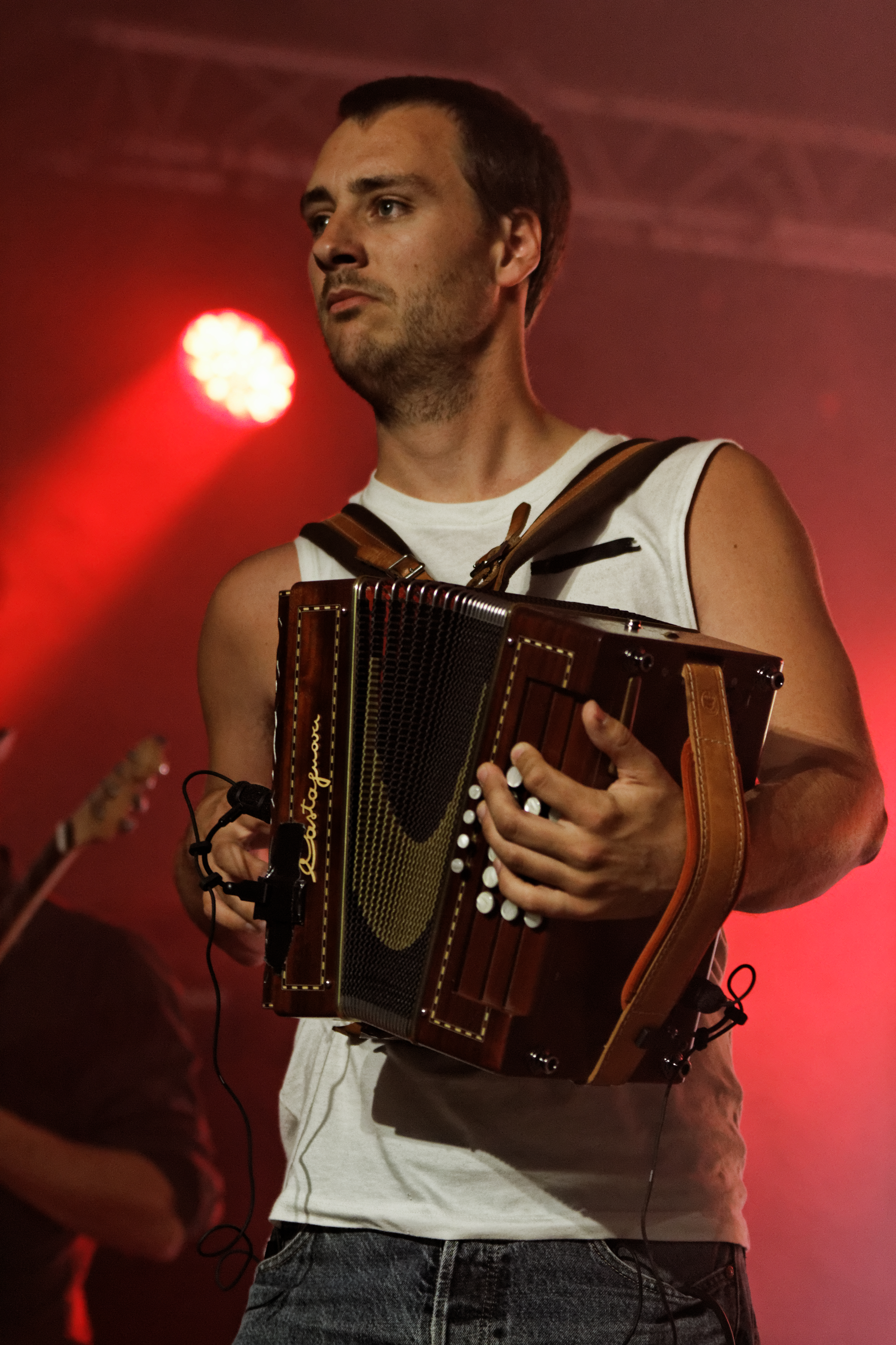 Startijenn en concert à l'espace évêché lors du festival de Cornouaille 2013.